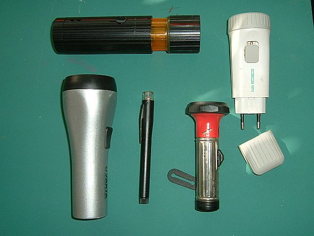 selbst fotografiert am 7.10.04, PD und GNUFDL, Bild: verschiedene Taschenlampen Lizenz